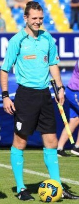 Alf Olav Rossland under kampen Jerv mot Tromsdalen